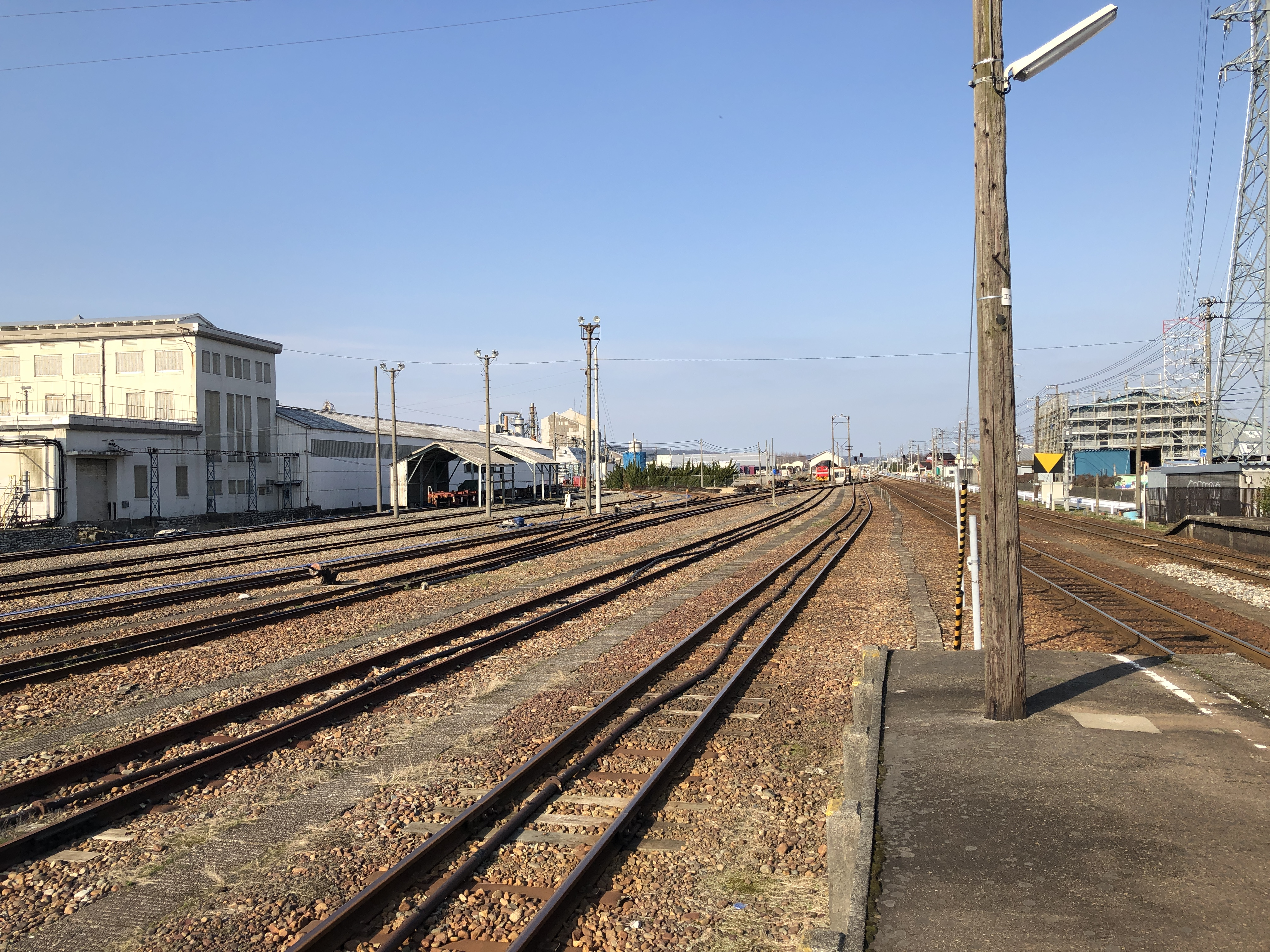 西日本旅客鉄道・日本貨物鉄道高山本線速星駅